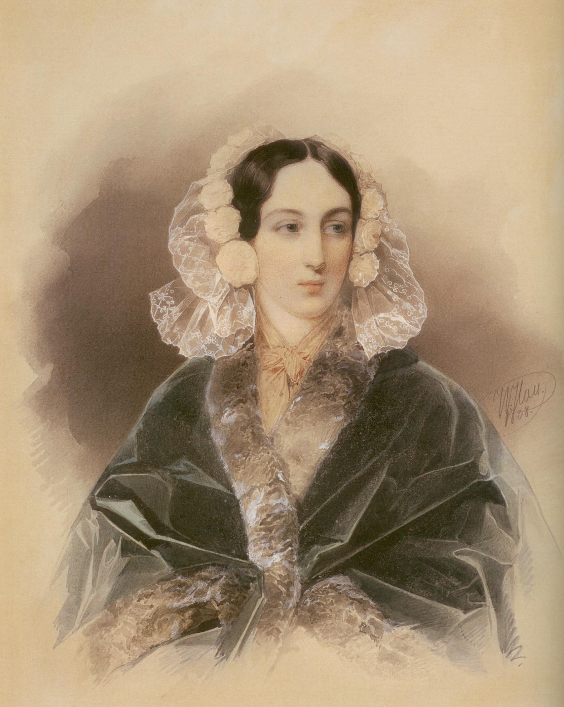 Мария Аркадьевна Бек, урож. Столыпина (1819-1889) Гау Владимир Иванович (1816 - 1895). Портрет Марии Аркадьевны Бек. 1838. картон на картоне, акварель, белила, лак 35.5 х 27.5 см. Государственный Русский музей.